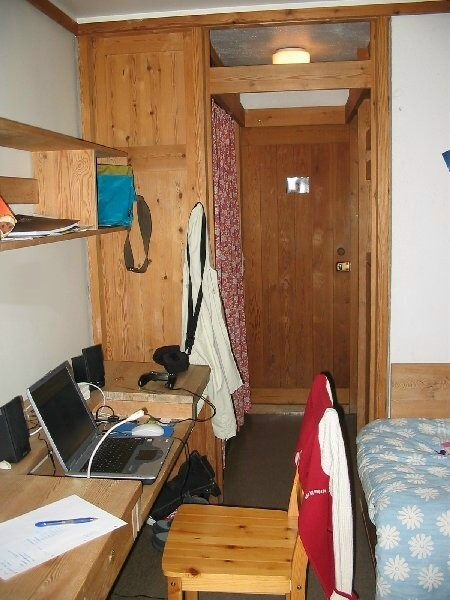 Chambre Universitaire à Fantoft en norvège !